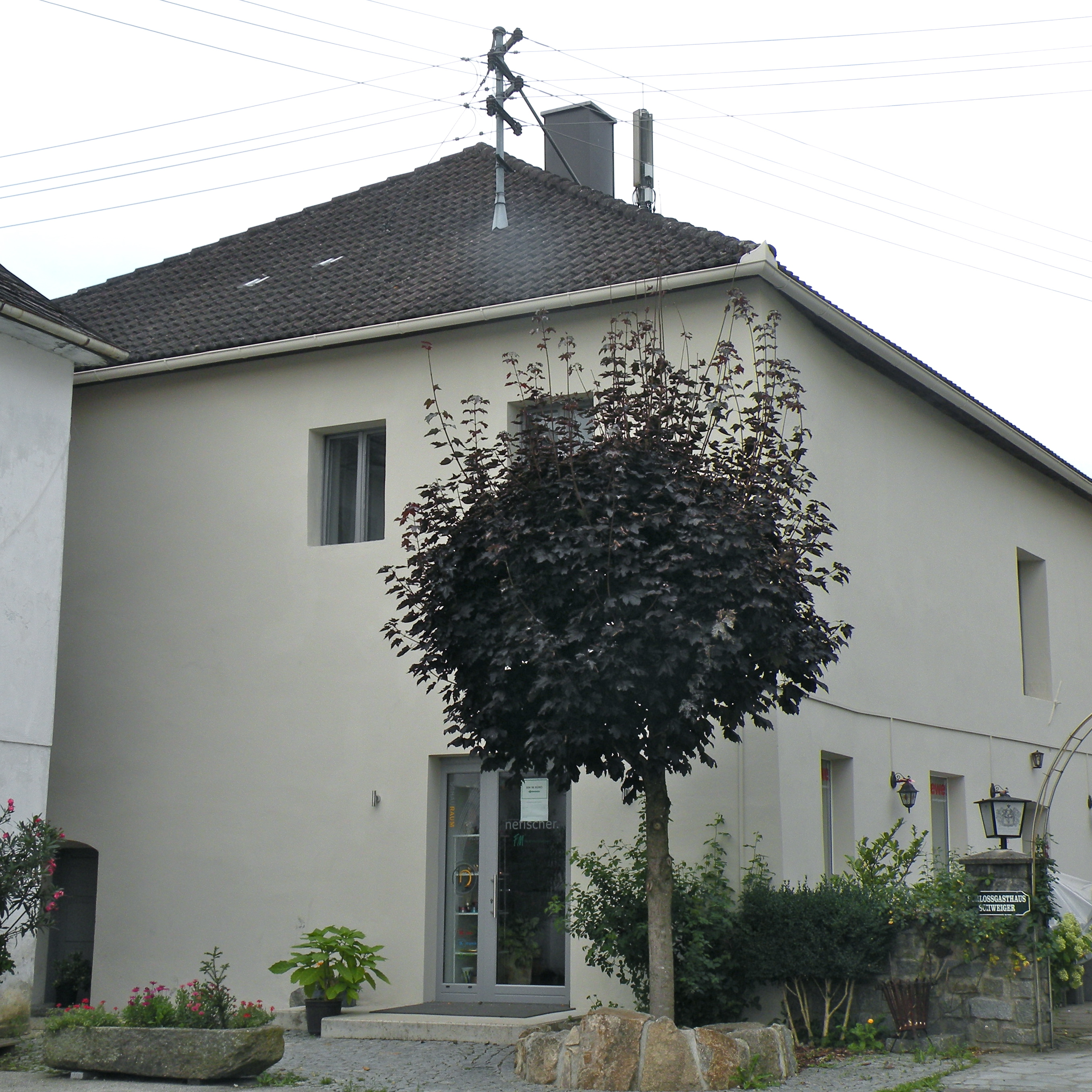 Jägerhäusl auf dem Schlossberg in Arbing im Bezirk Perg in Oberösterreich